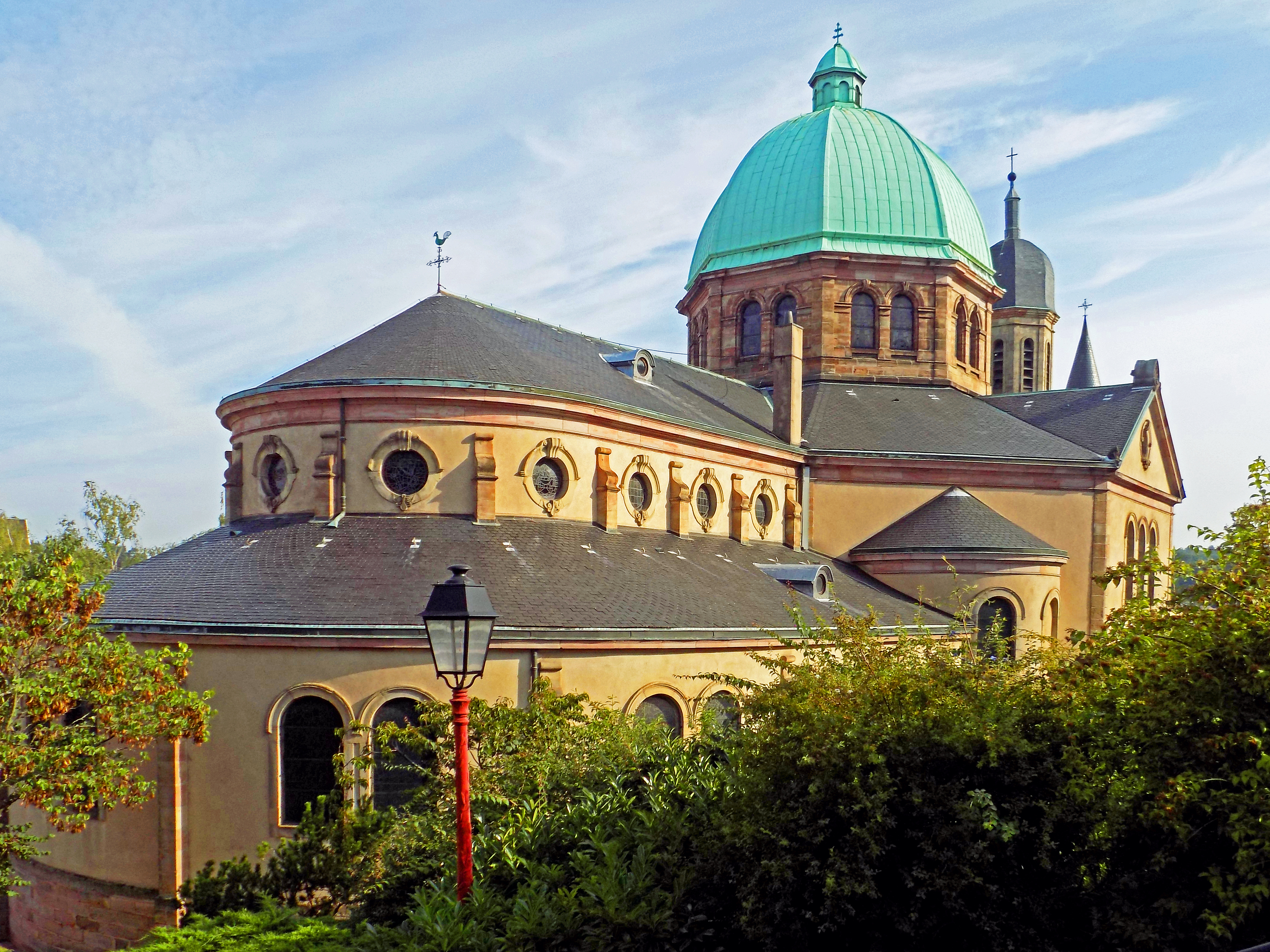 Église Sainte-Croix appelée aussi église du Centre, de Creutzwald (Moselle), construite en 1730, reconstruite de 1763 à 1771, agrandie en 1862 (avec ajout d'un narthex et d'un clocher monumental) et transformée en 1911 par volonté du curé Stenger en style romano-byzantin avec coupole.